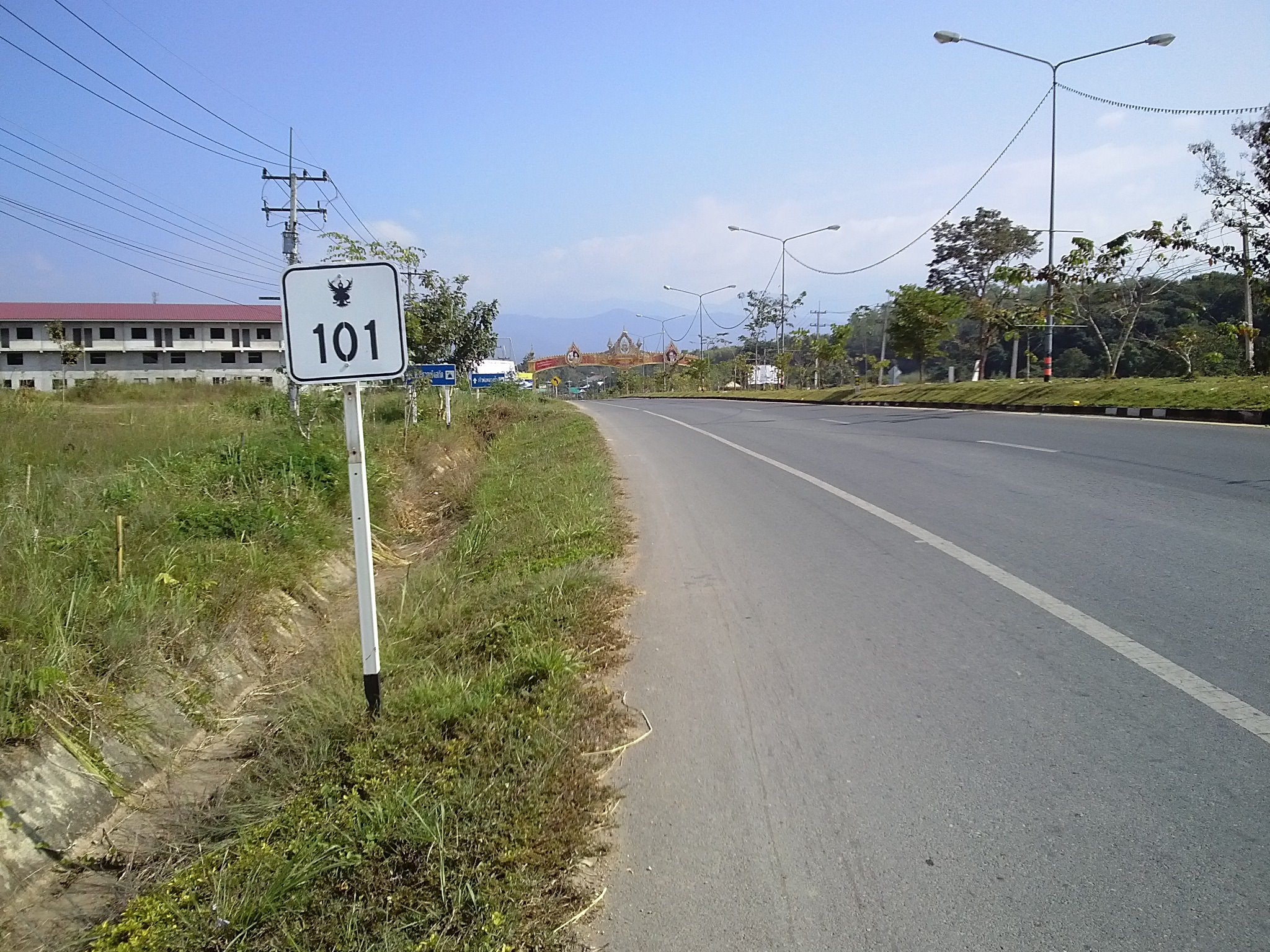 ทางหลวงแผ่นดินหมายเลข 101 ตอน ท่าวังผา-ปัว